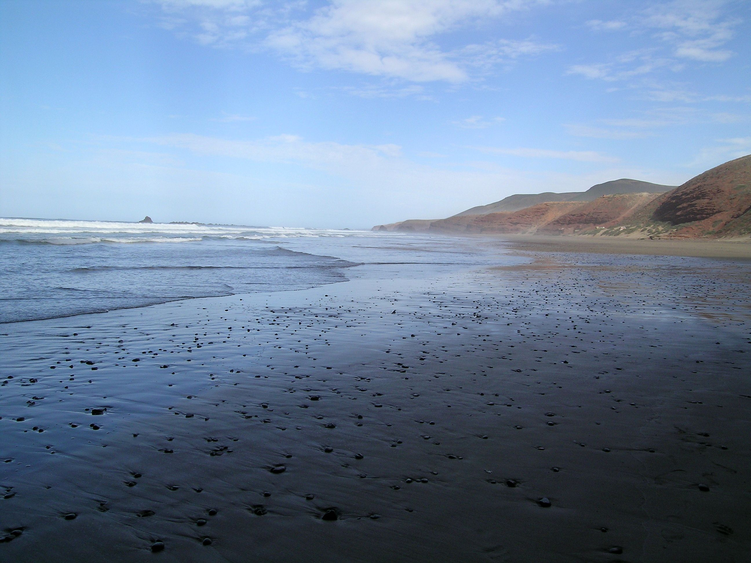 Playa de Lagzira en Sidi Ifni (Marruecos)